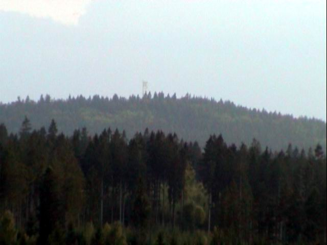 Vítkův kámen od Lipenské přehrady